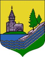 Герб Кондопоги